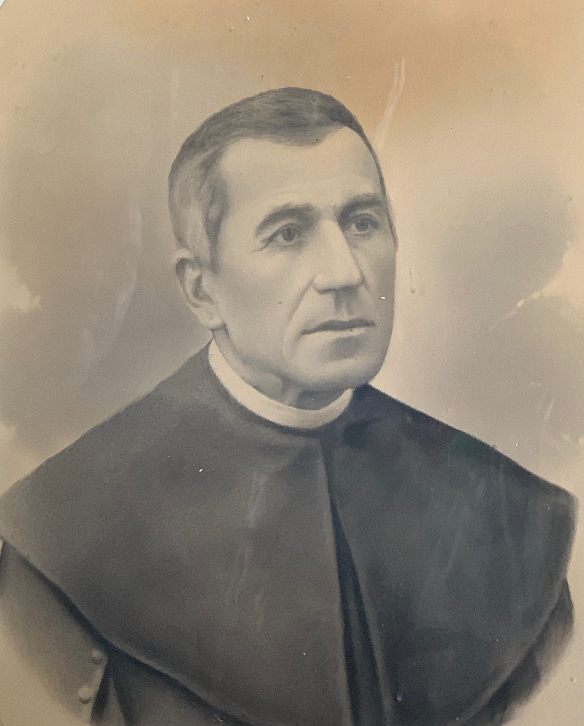 R.D. František Veselý, farář - Nebužely, kol. r. 1890